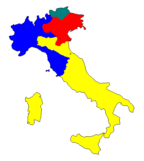 Carta d'Italia secondo i semi delle carte da gioco; ridisegnata da zero seguendo i colori e i confini segnalati nelle fonti semi tedeschi semi (nord-)italiani semi francesi semi spagnoli